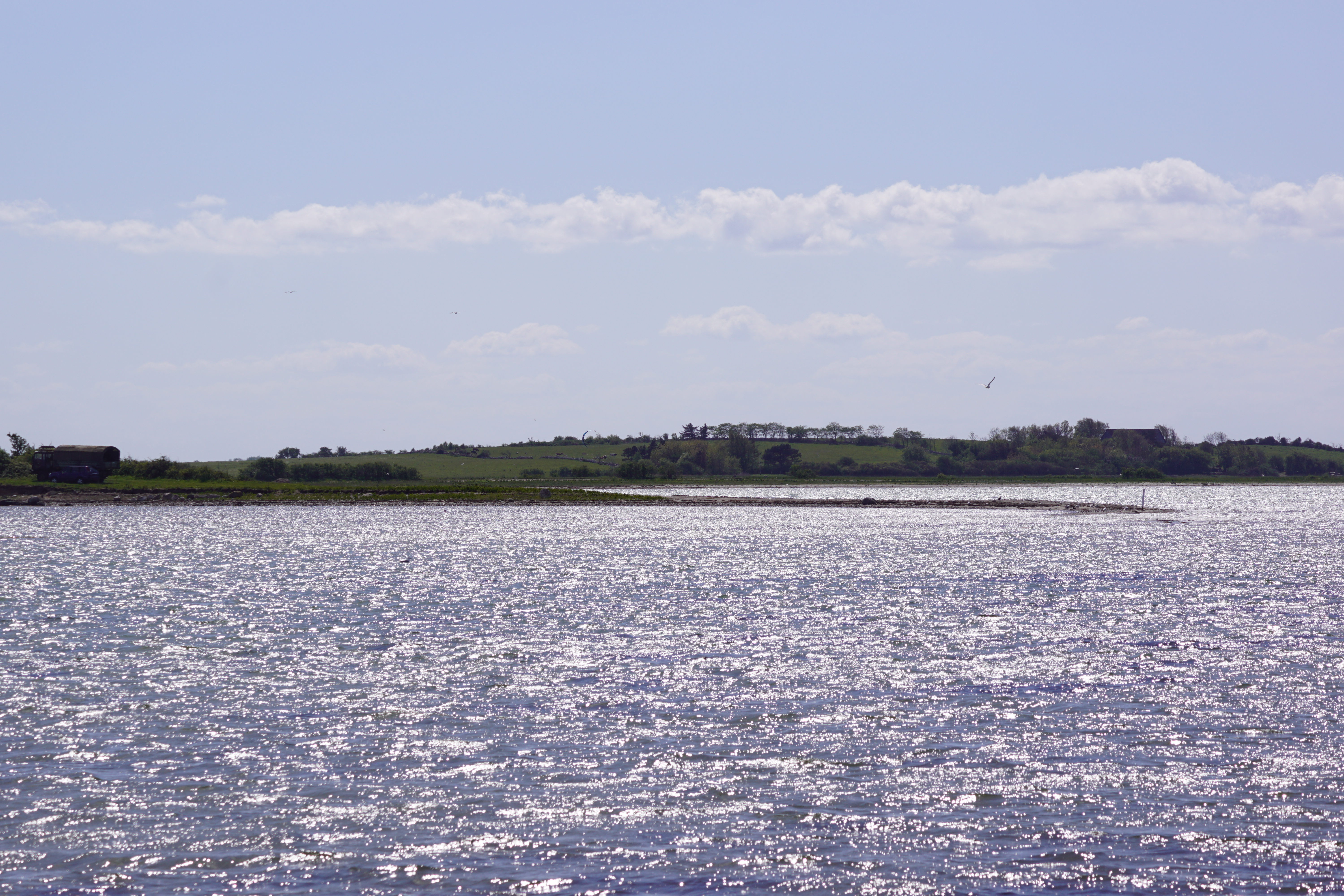 Store Svelmø med Lille Svelmø i forgrunden til venstre